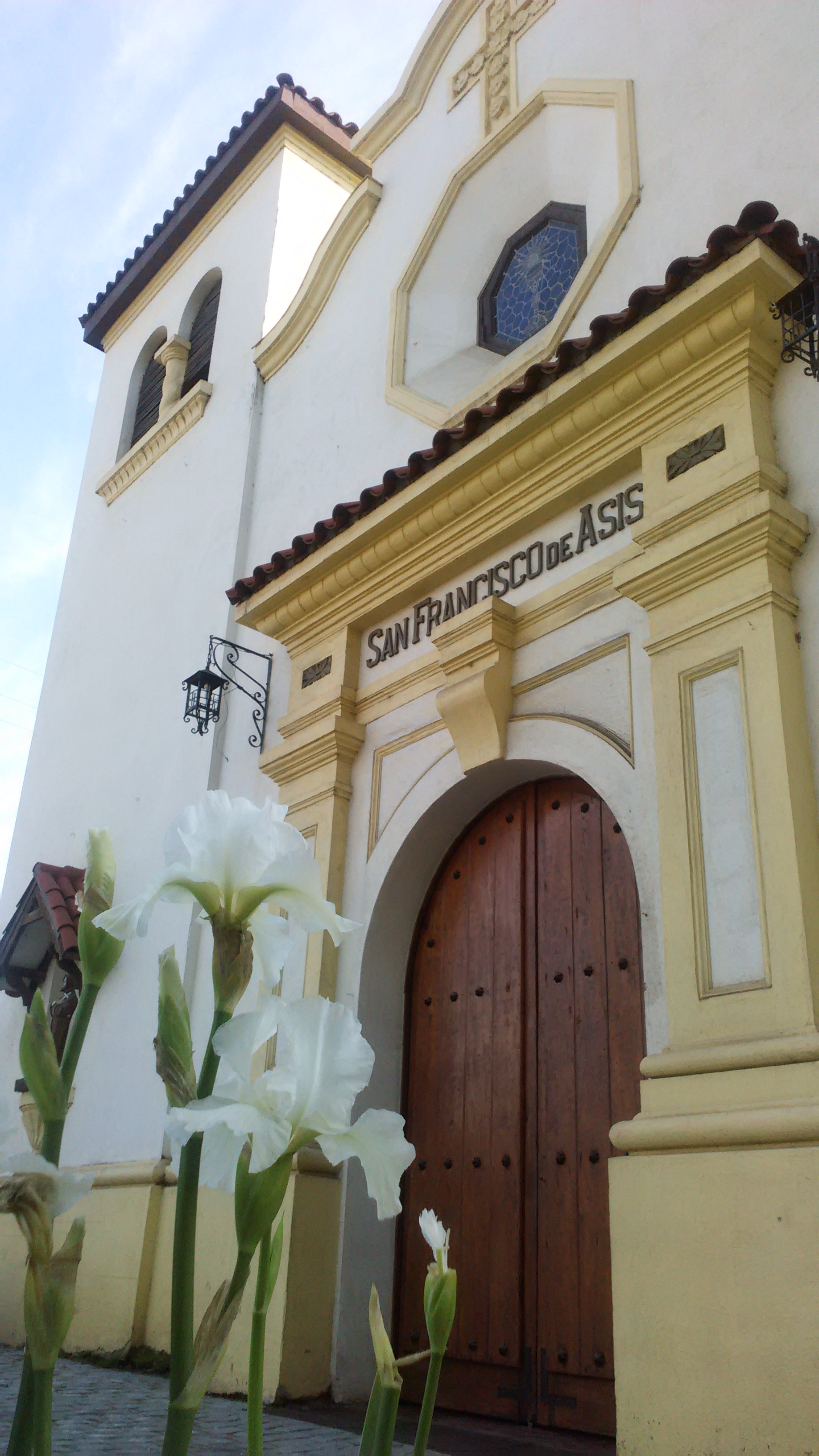 Iglesia de San Francisco en la localidad de Mostazal, VI Región en el centro de Chile